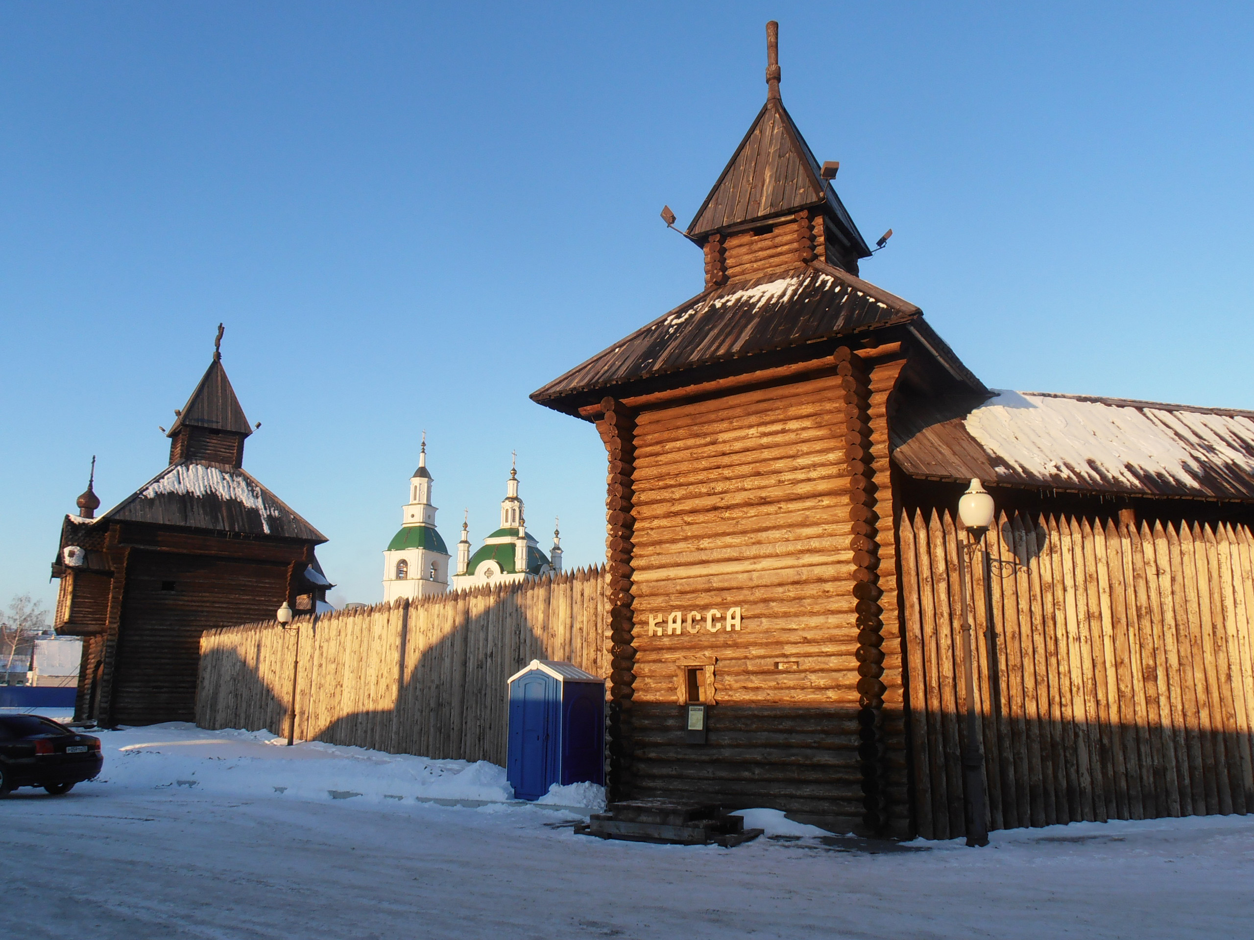 Музейный комплекс "Ялуторовский острог" (г. Ялуторовск, ул. Ленина, 5). Касса.